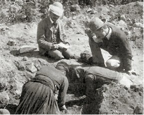 Un ouvrier grec, la femme d'Arthur Evans et Duncan Mackenzie